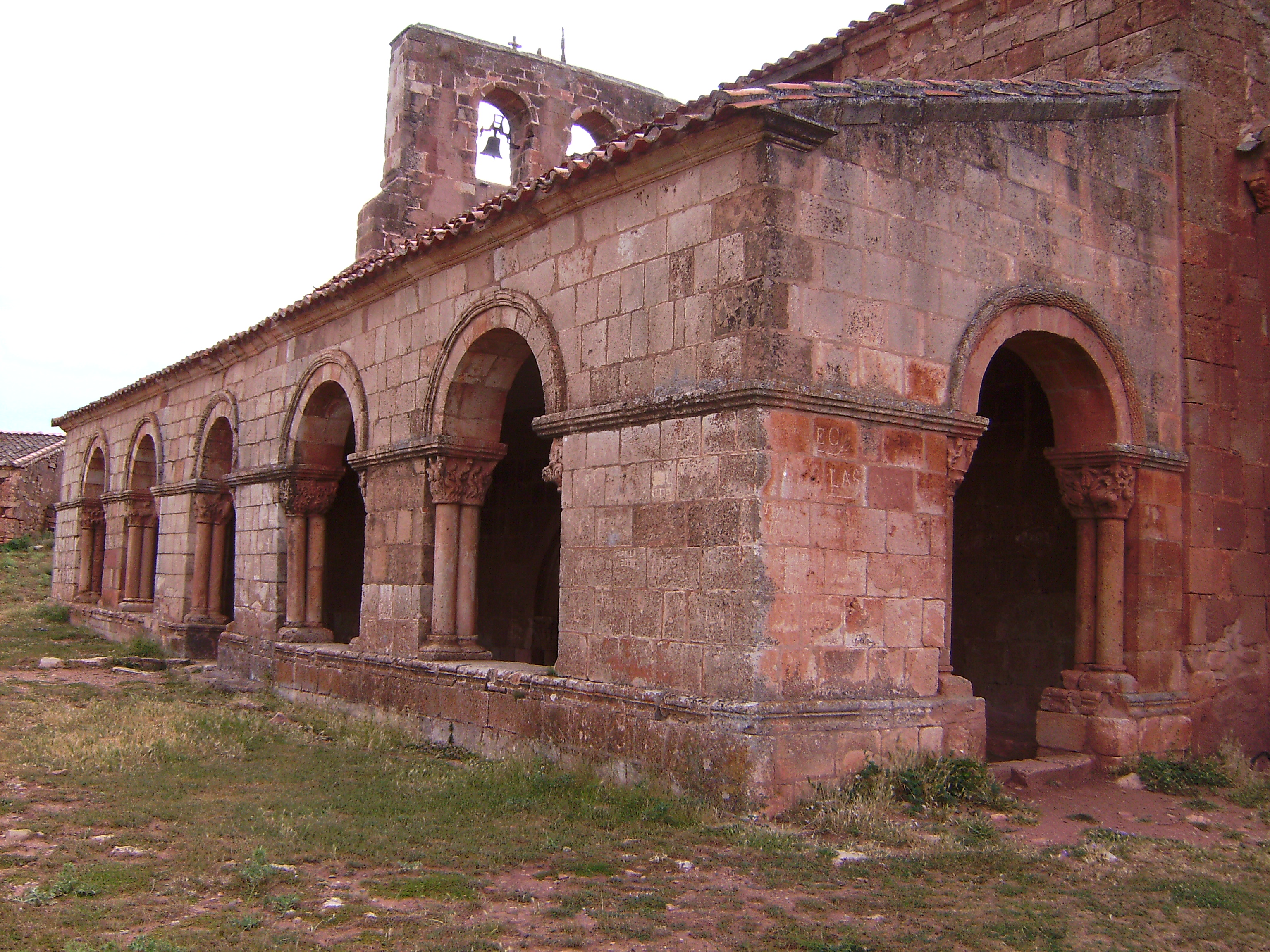 Tiermes - Iglesia de Santa Maria (Galeria Porticada)